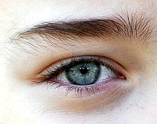 Данный снимок я делал с фотоаппаратом Nikon D90, днём в парке . Портрет и правый глаз выделил в фотошопе.